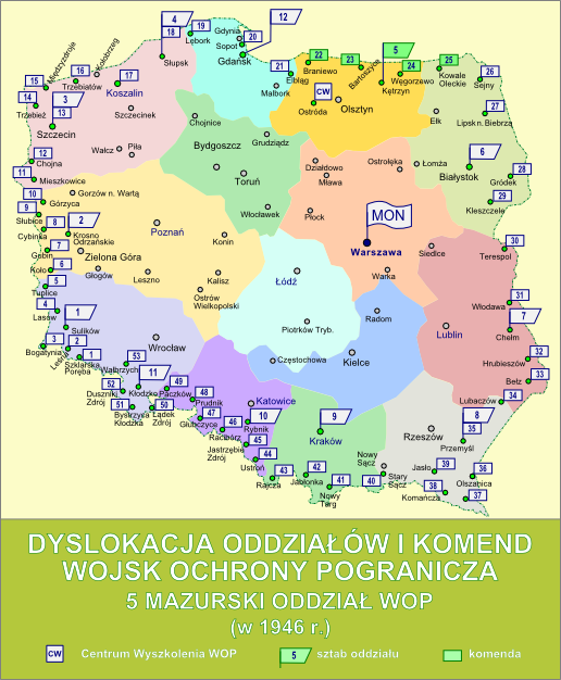 Dyslokacja oddziałów i komend Wojsk Ochrony Pogranicza w październiku 1946 r. - 5 Mazurski Oddział WOP